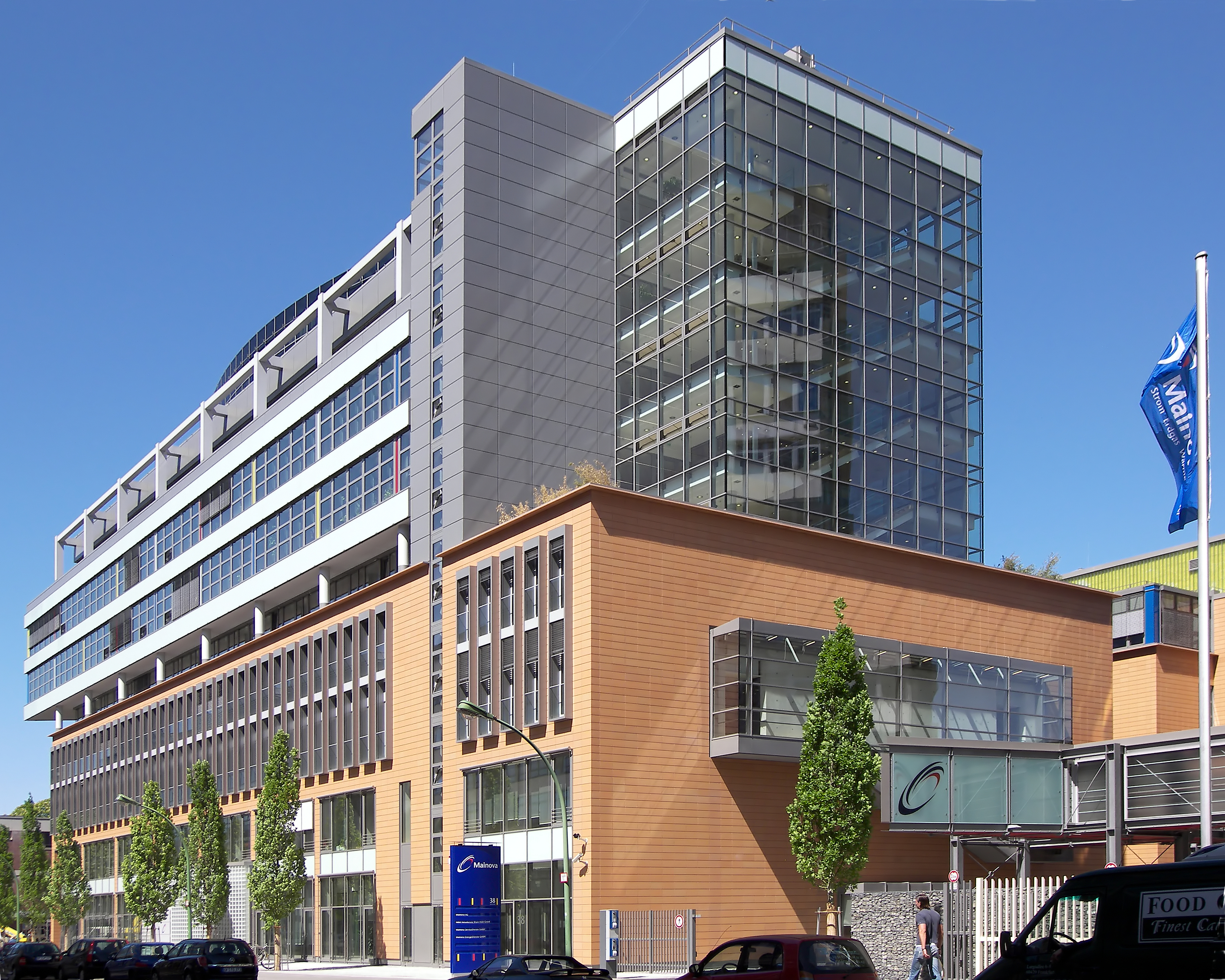 Zentrale der Mainova in Frankfurt am Main Bockenheim, Solmsstraße